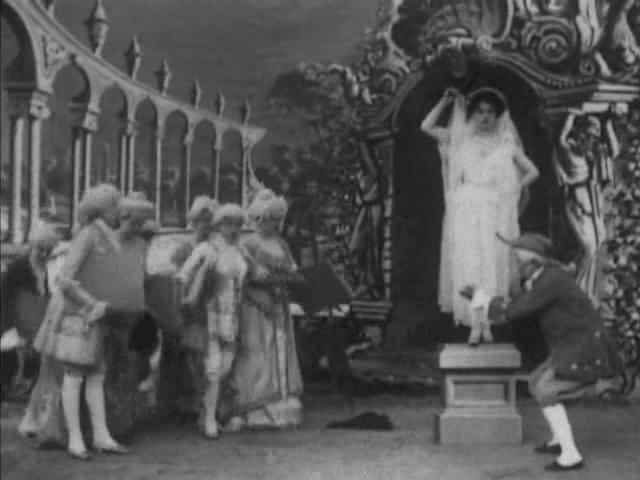 photo du film "La Statue animée" (Méliès, 1903)